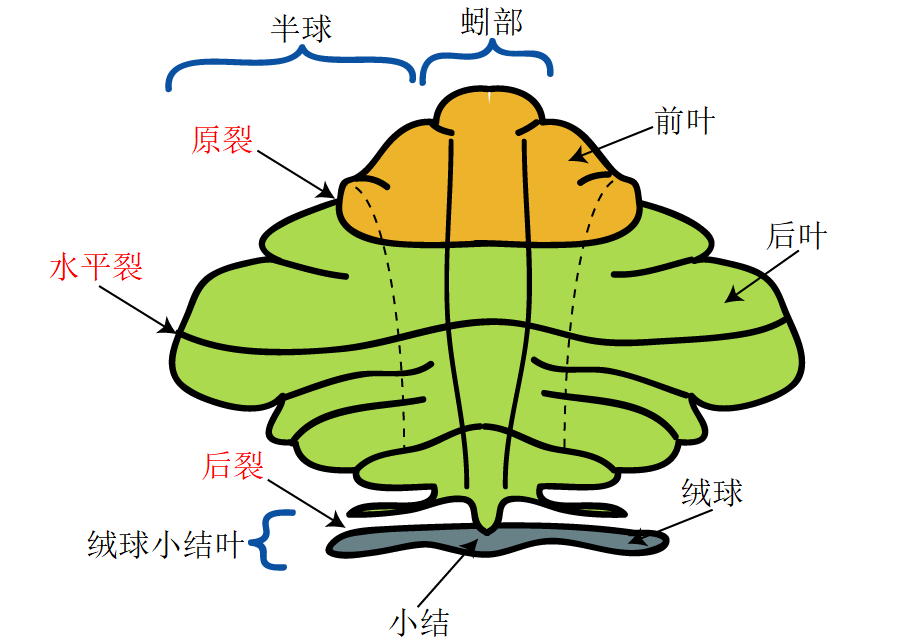 小脑主要解剖学部分的示意图。由Nrets绘制。